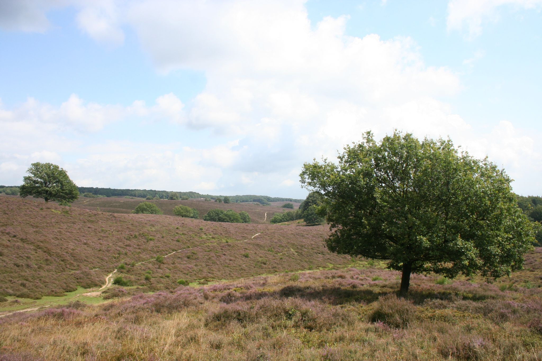 Heidevelden in het nationale park Veleuwezoom This is a photo or sound file made in Veluwezoom National Park in the Netherlands, with the main subject of the file in the category: landscapes